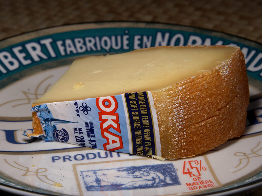 Oka Cheese.